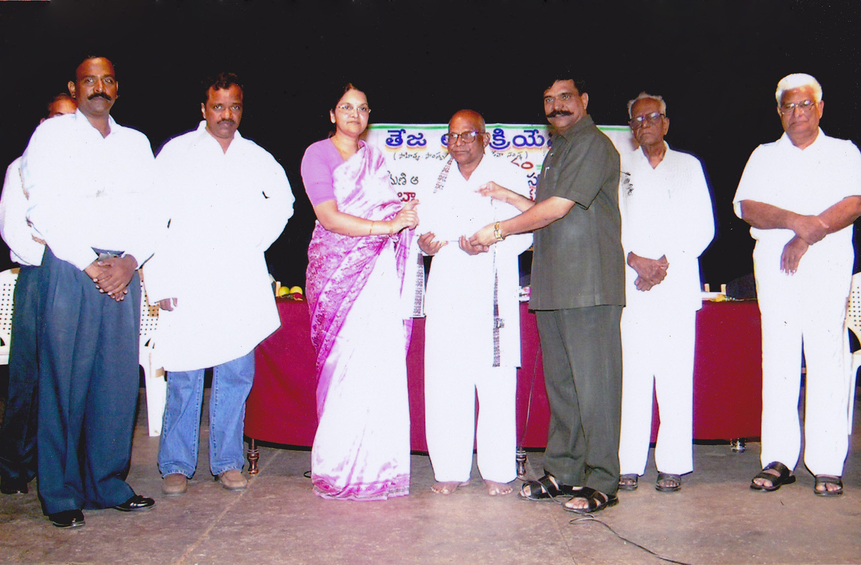 తెలుగు విశ్వవిధ్యాలయం వైస్ చాన్స్‌లర్ ఆచార్య మంజుల గారిచే తేజ ఆర్ట్స్ క్రియేషన్స్ అవార్డు ప్రధానం